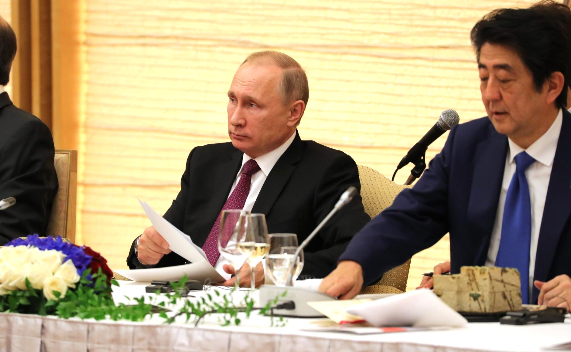 Российско-японские переговоры. Президент России Владимир Путин с Премьер-министром Японии Синдзо Абэ